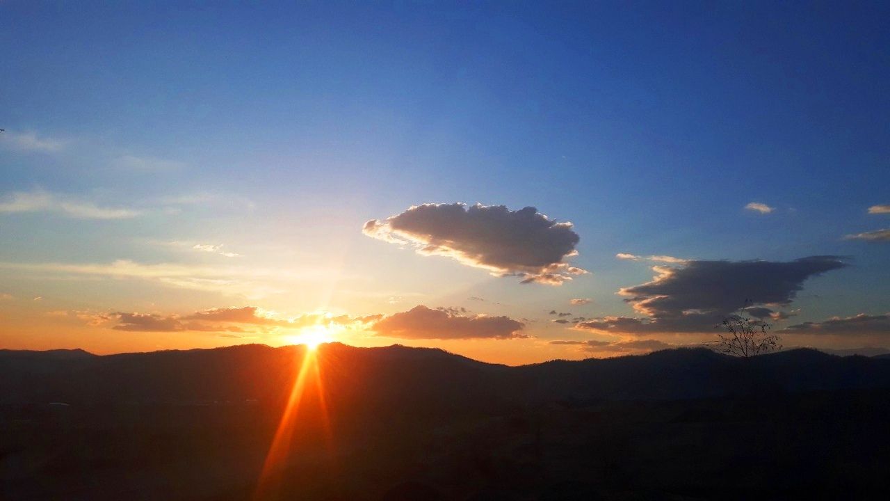 Dawn. Buryatia, Russia